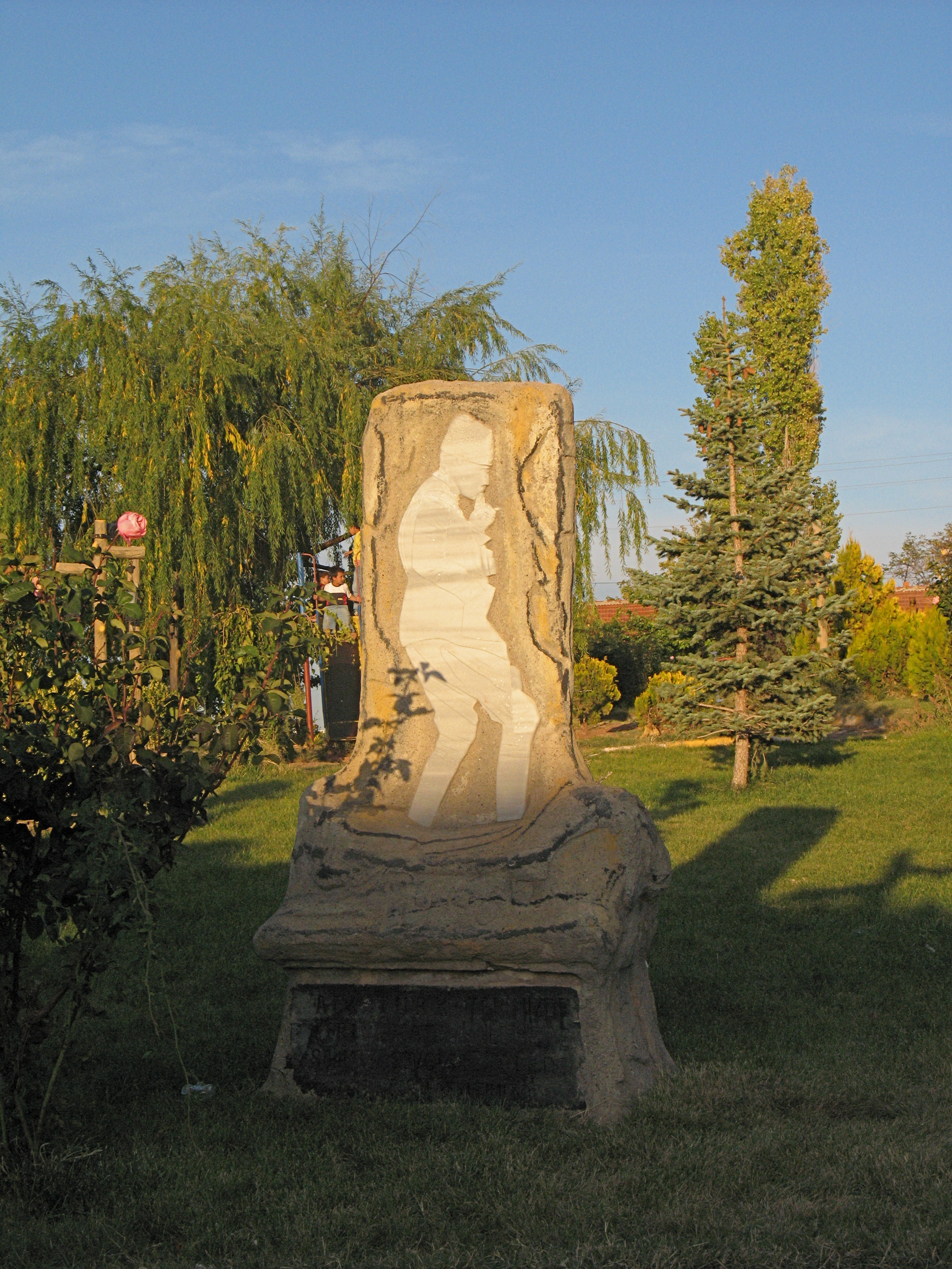 Хаджибекташ_2007_1219